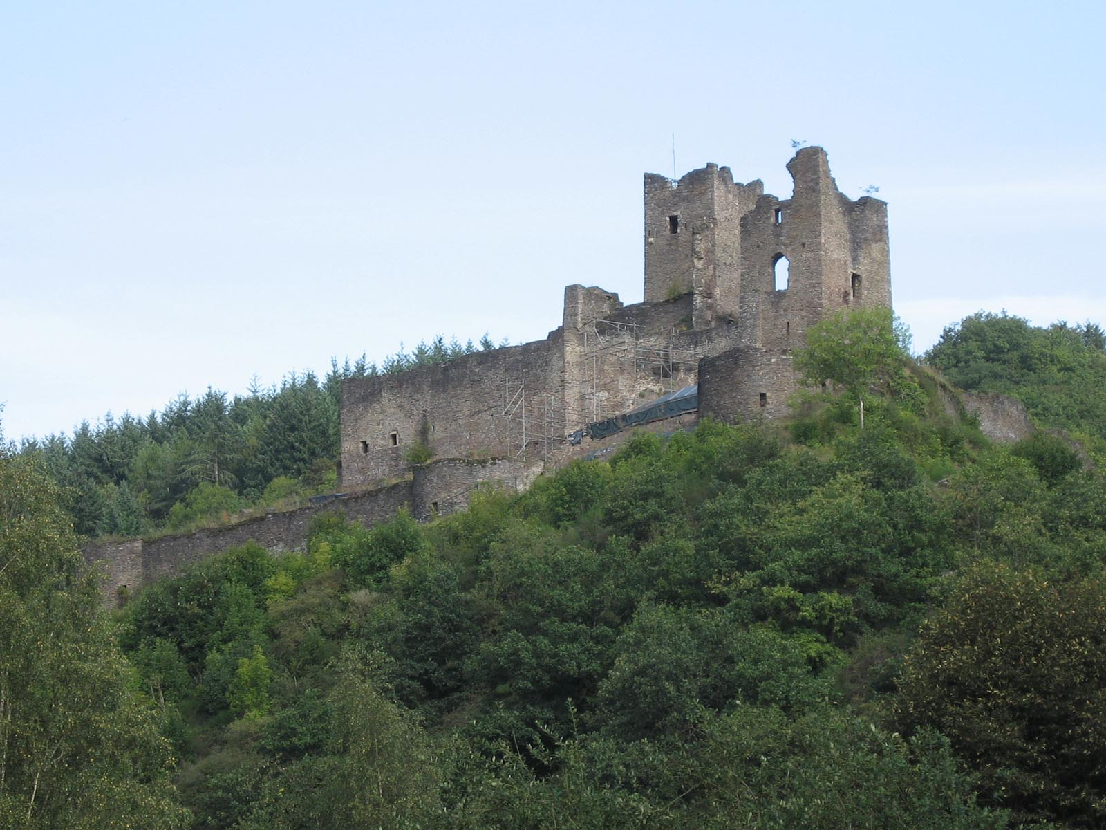 Brandenbourg burcht